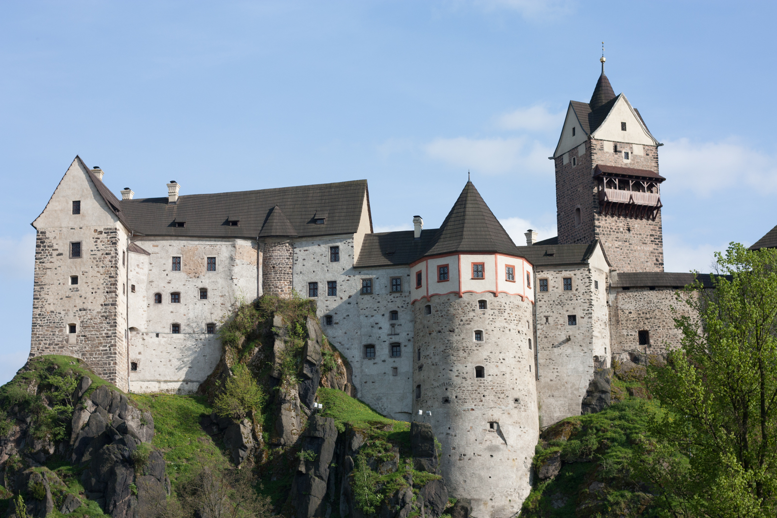 Hrad Loket (Loket), Zámecká 66, Loket